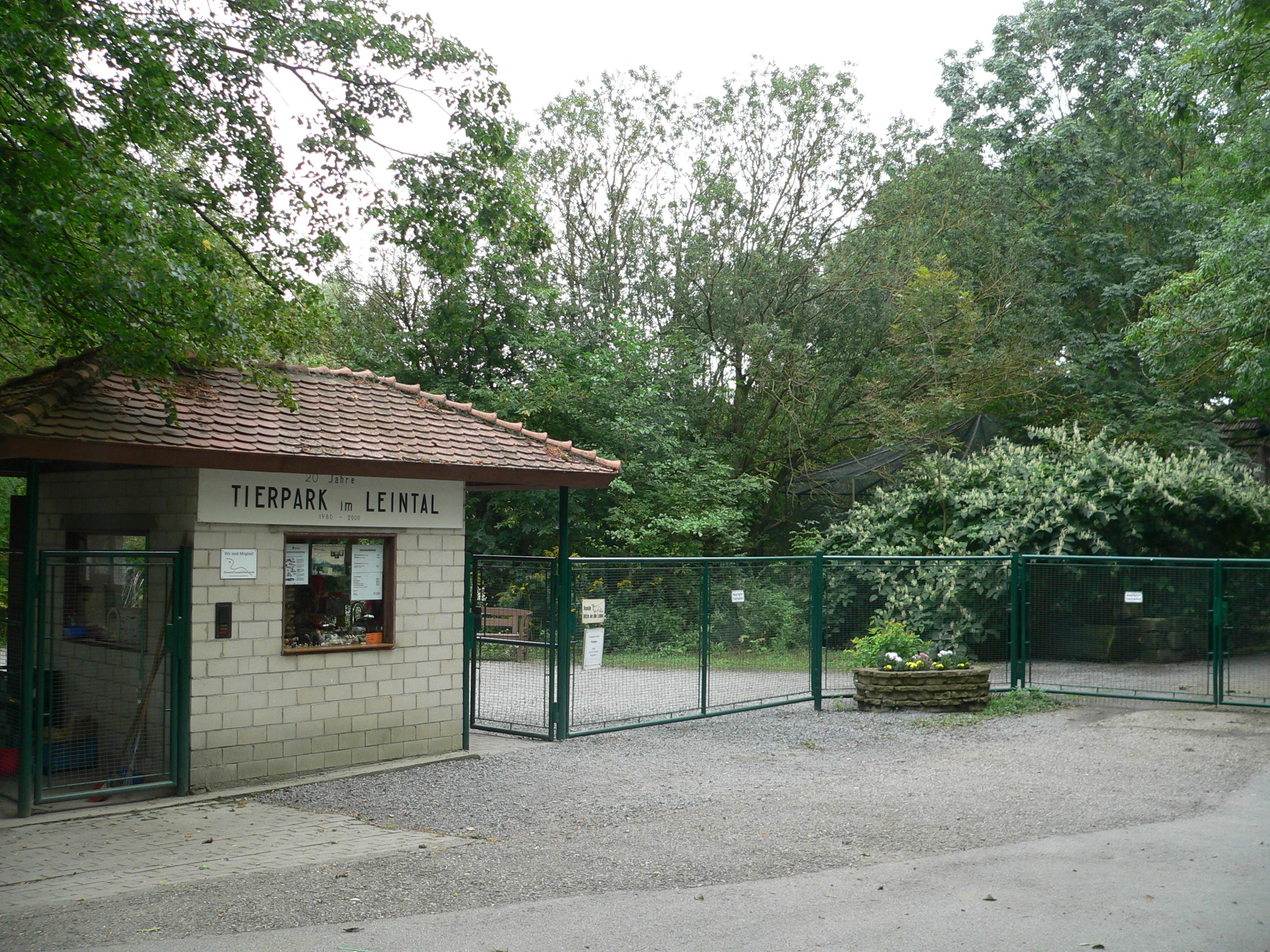 Little Zoo "Tierpark im Leintal" Of Schwaigern/Germany